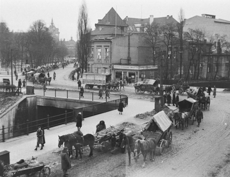 Deutsche Zivilisten im Februar 1945 in Danzig und Umgebung; auf der Flucht vor der herannahenden Roten Armee haben sie ihre Heimat verlassen. 20./21. Februar 1945